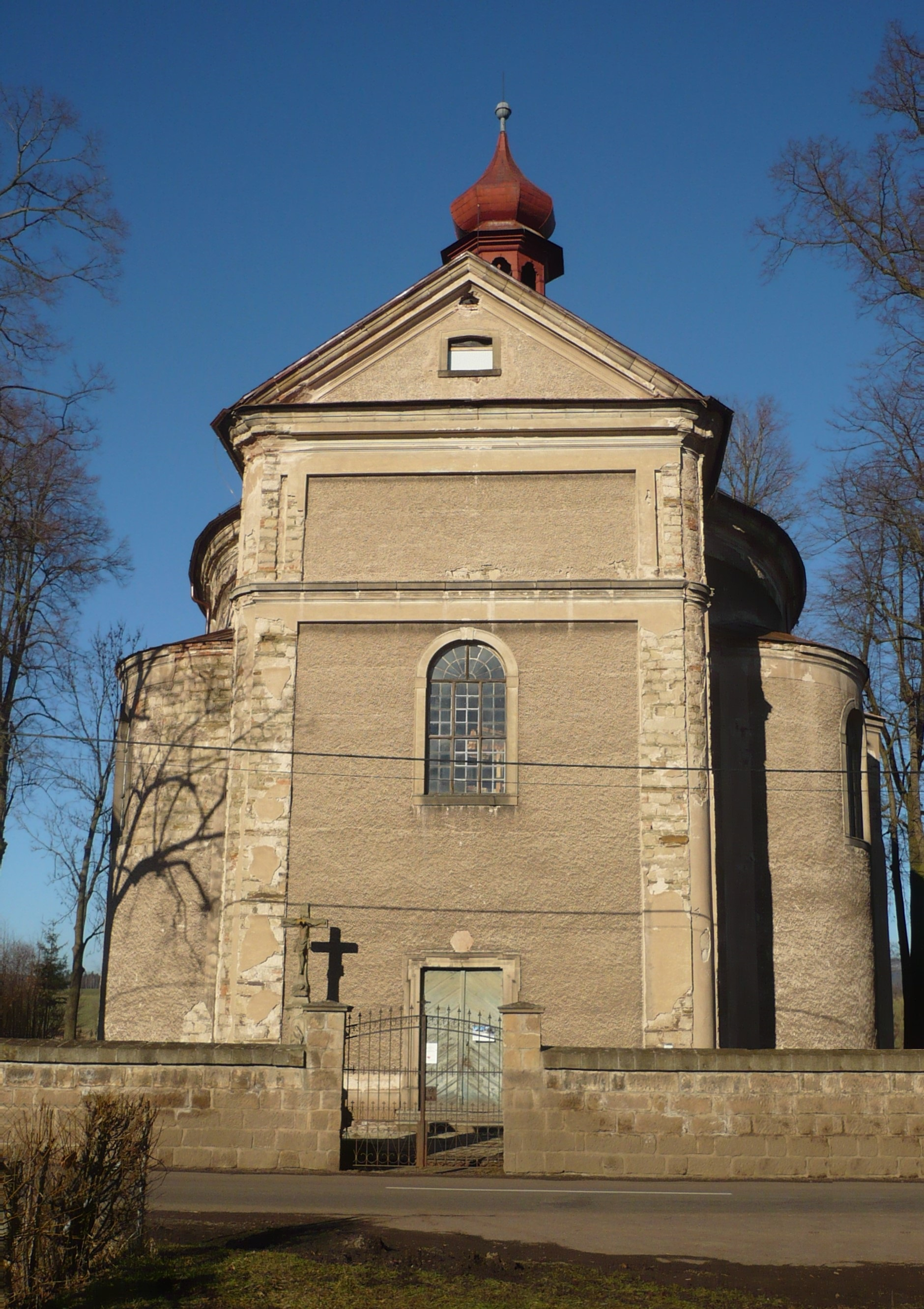 Otovice, kościół pw. św. Babary